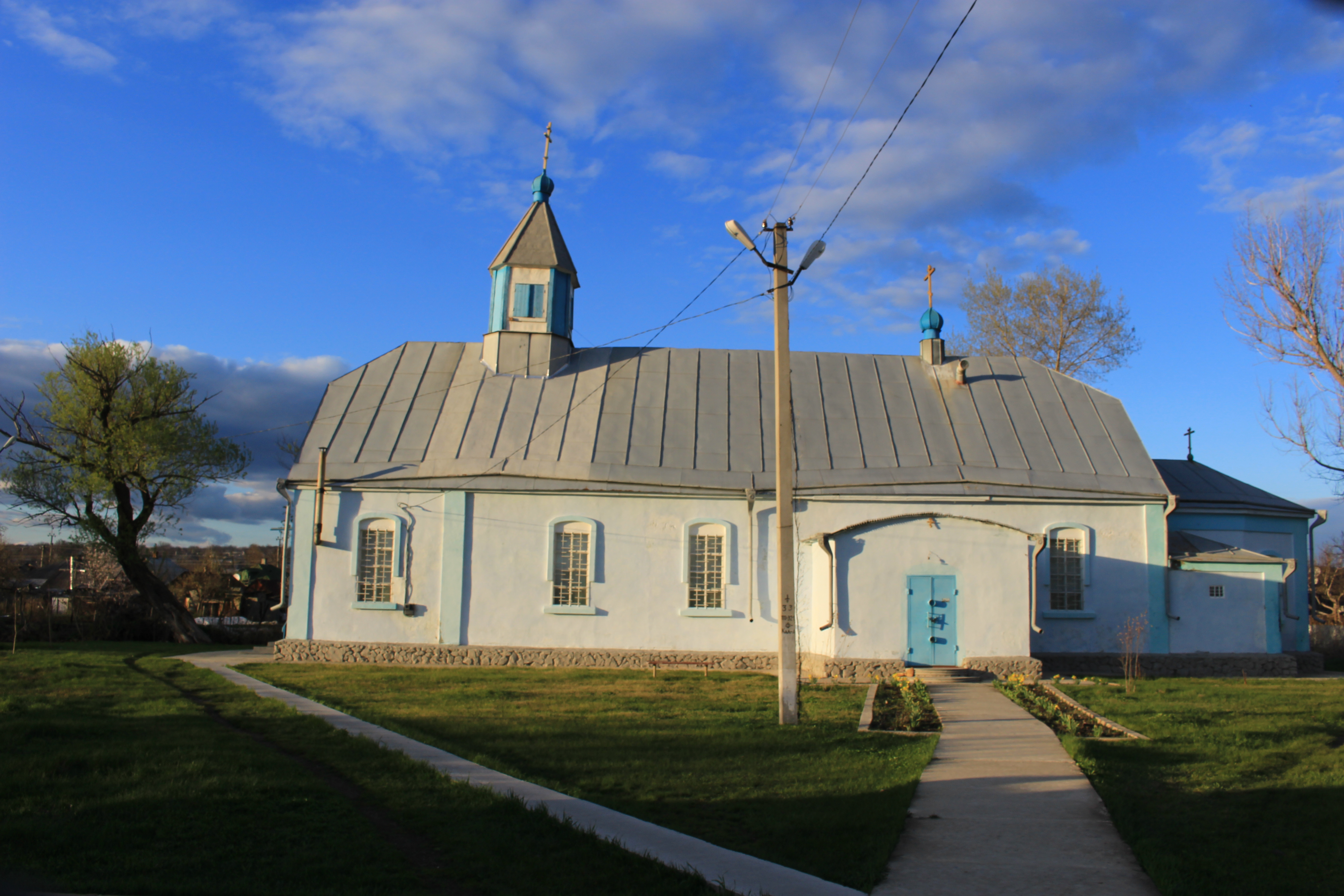 Церква старообрядницька, Балта, вул. Шоніна